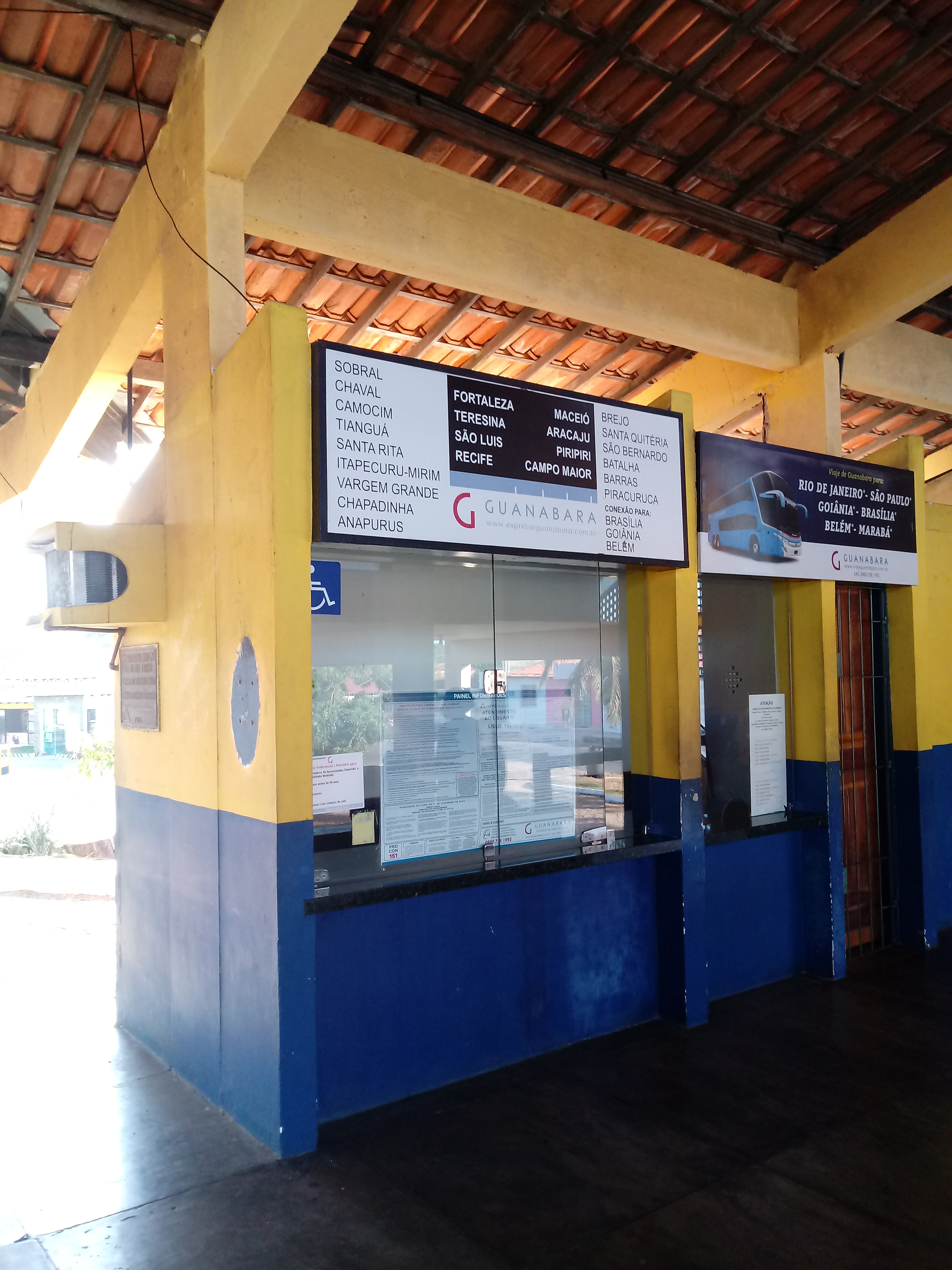 Box no interior da Terminal Rodoviário de Luís Correia no amanhecer do dia 27 de outubro de 2019.